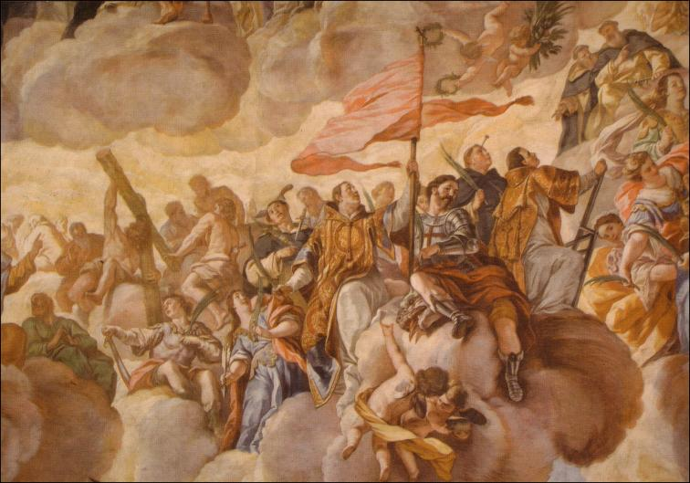 above